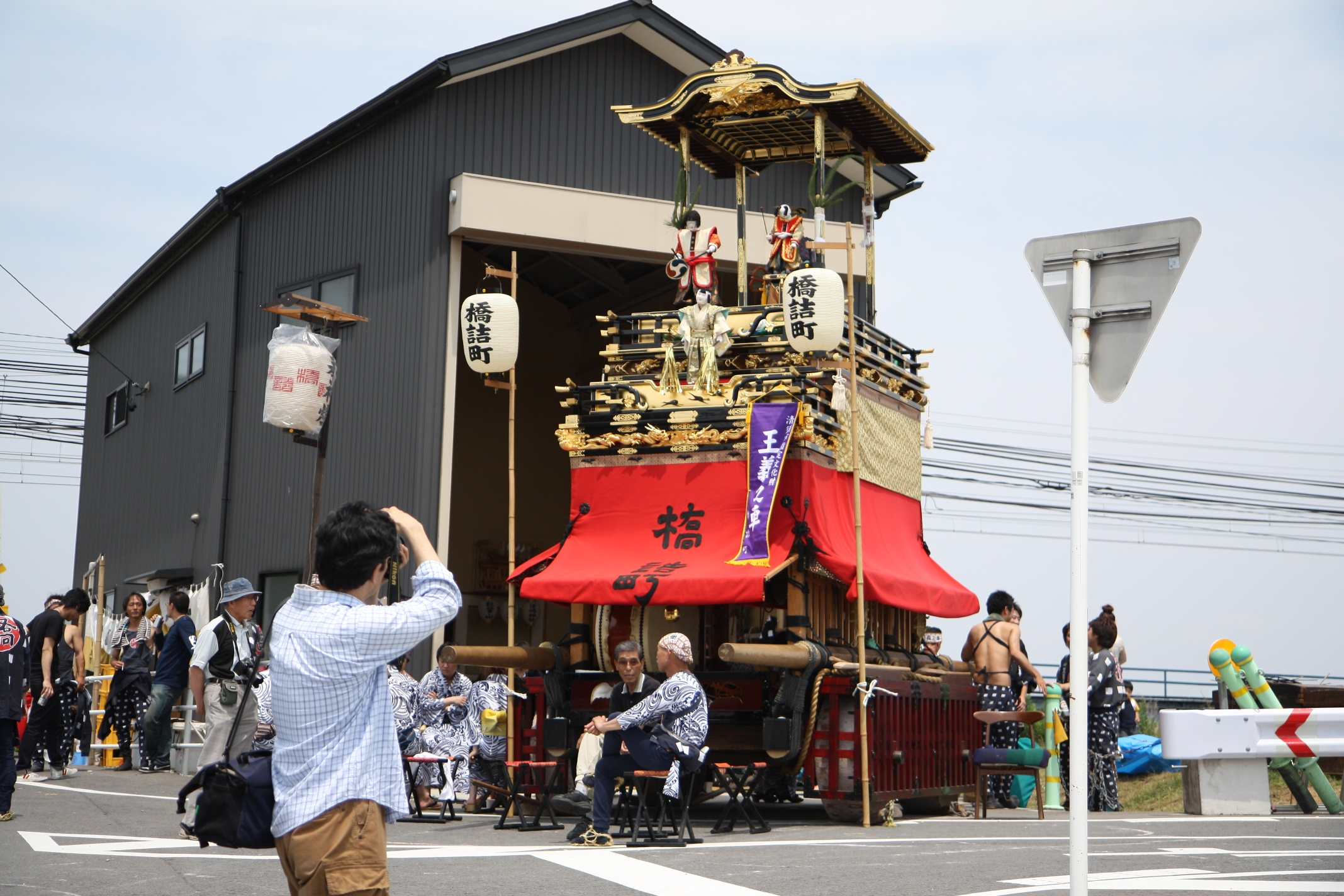 西枇杷島祭 (愛知県清須市西枇杷島町)